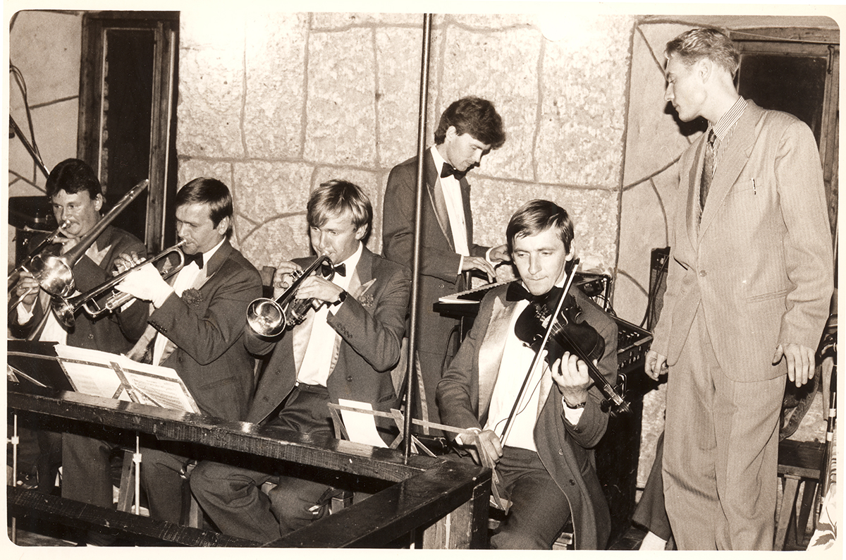 Modern Fox 89. Priit Zimmermann, Aivar Raigla, Uko Paabumets, Ülo Mälgand, Henno Soode ja Mart Sander